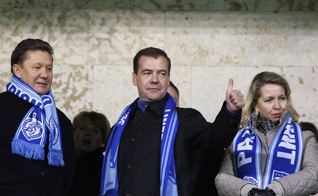 Дмитрий и Светлана Медведевы, председатель правления компании «Газпром» Алексей Миллер на футбольном матче «Зенит» – «Шахтёр».